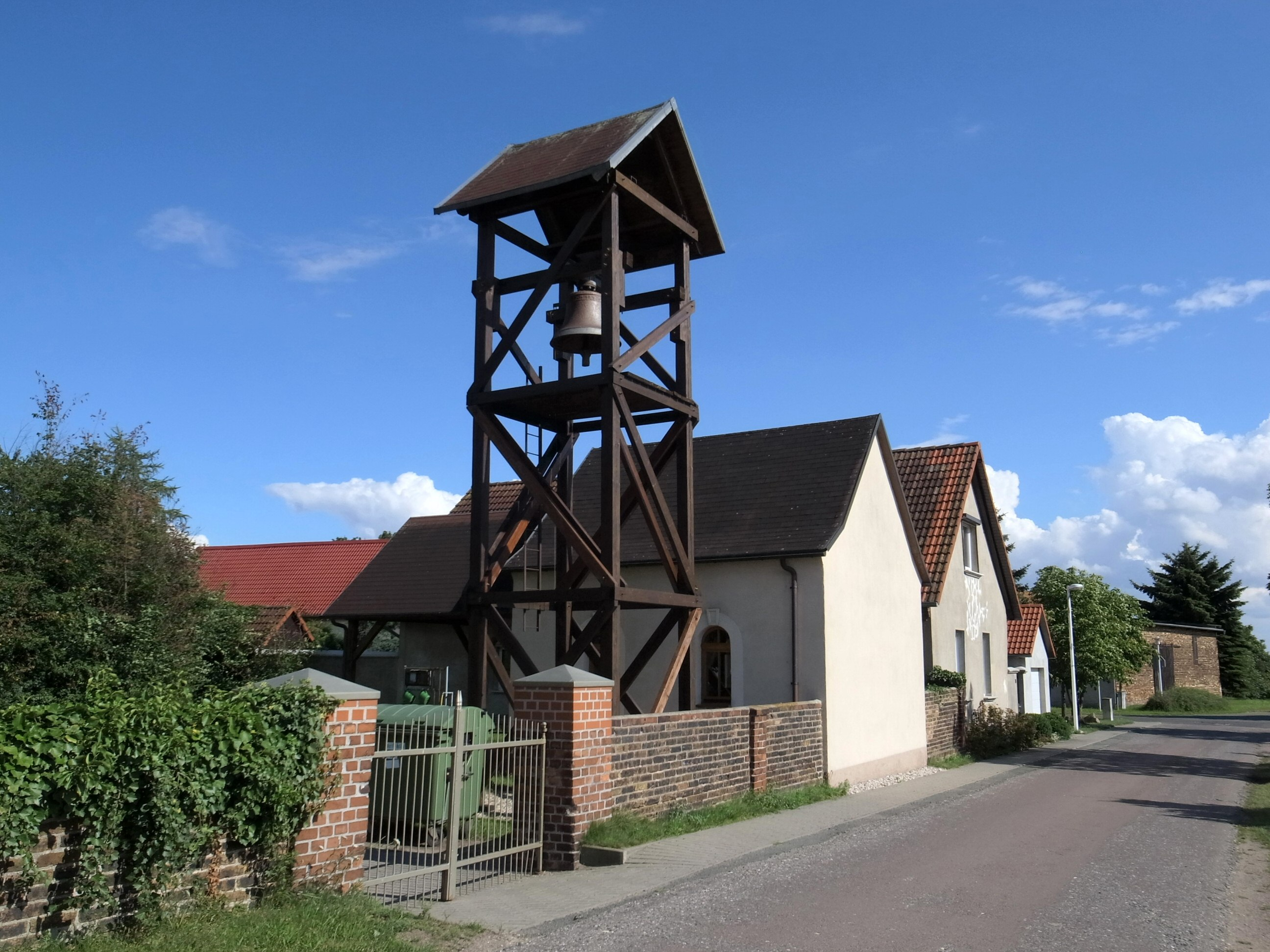 Bitterfeld-Wolfen, Ortsteil Zschepkau, Glockenturm am Friedhof.